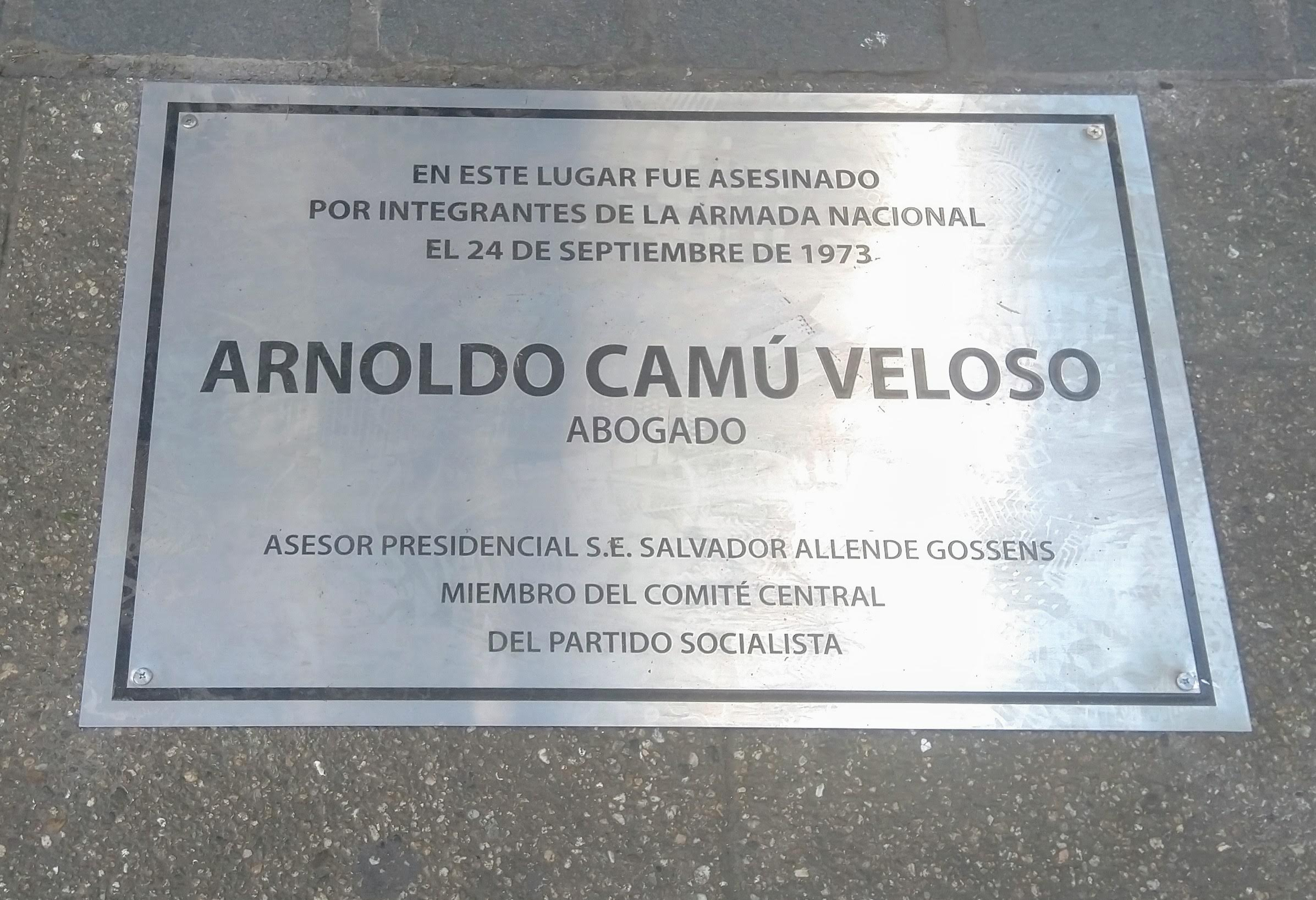 Placa en recuerdo de Arnoldo Camu Veloso (1 de junio de 1937 - 24 de septiembre de 1973) fue un abogado y político socialista chileno. Camu fue asesinado en la calle, presuntamente por agentes del gobierno chileno poco después del Golpe de Estado en Chile de 1973.1​2​ Camu era miembro del Buró Político del Partido Socialista de Chile